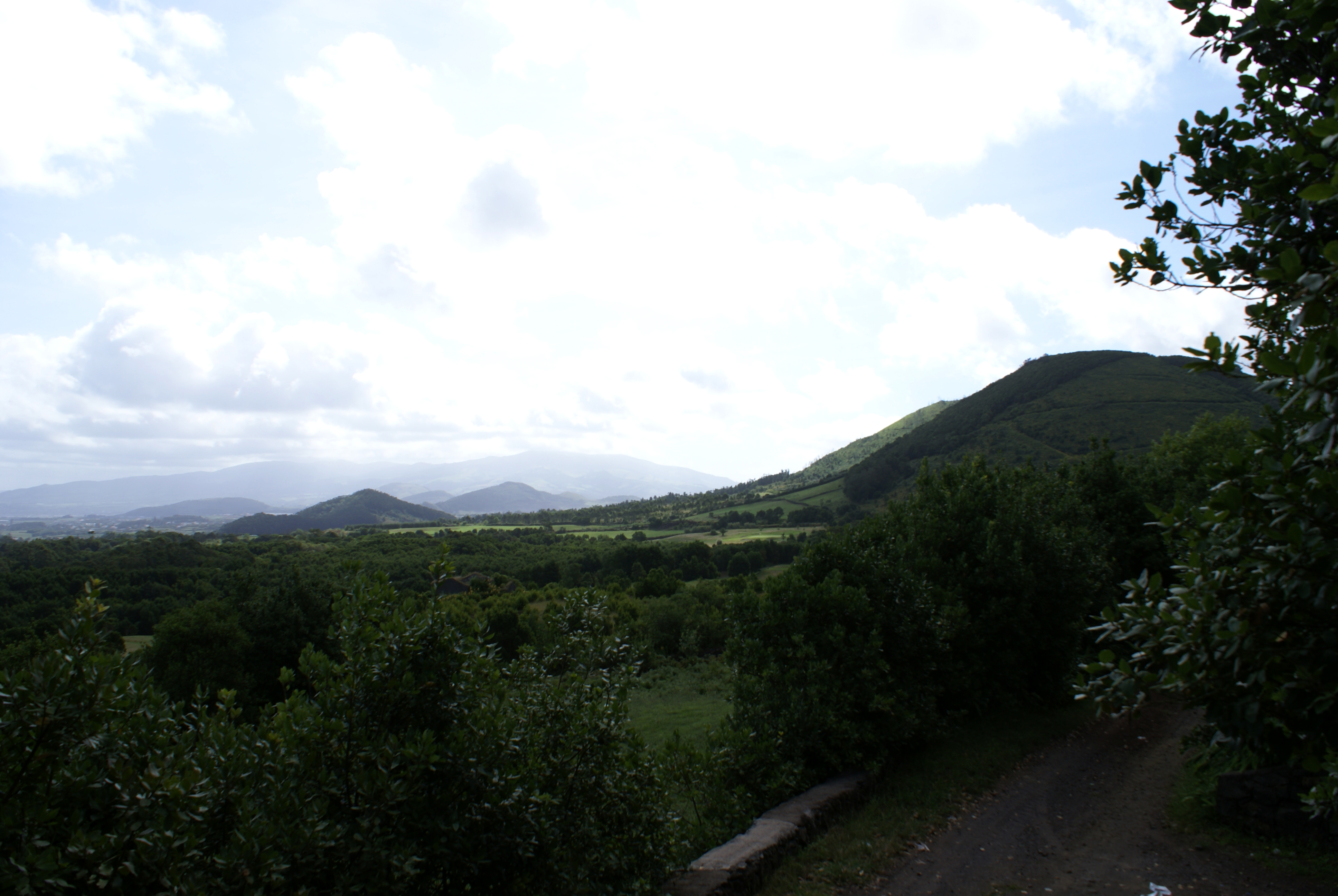 Miradouro dos Aflitos, Batalha, Ponta Delgada, ilha de São Miguel, Açores